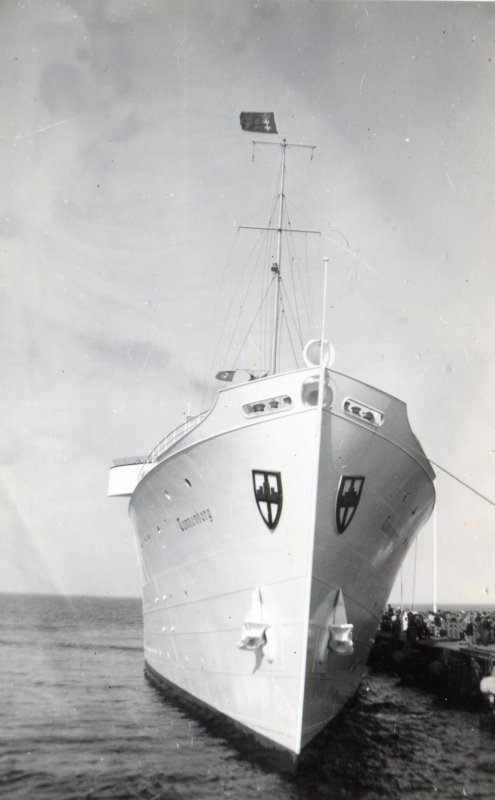 Die Tannenberg war eine deutsche Passagier- und Autofähre, die 1935–1939 in der Ostsee nach Ostpreußen verkehrte und im Zweiten Weltkrieg von der Kriegsmarine requiriert und als Minenschiff genutzt wurde (historische Aufnahme aus den 1930er Jahren).